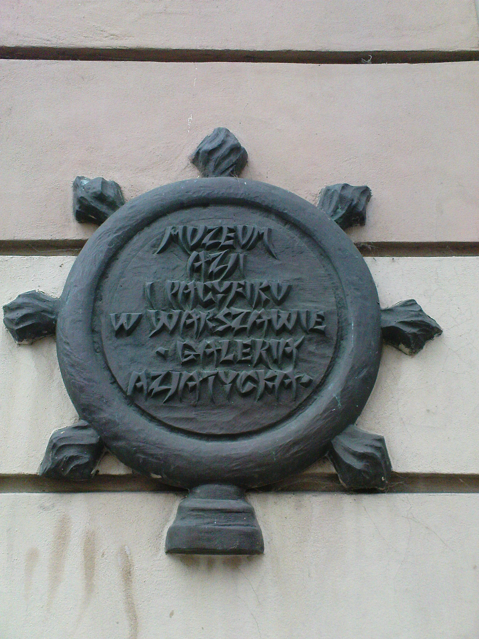 Kamienica Jakuba Maraszewskiego – „Pod Samsonem w Warszawie na ul. Freta 5 - Muzeum Azji i Pacyfiku w Warszawie i Galeria azjatycka - logo